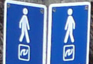 På Nordsøvandreruten anvendes som regel en dansk vandremand med et North Sea Trail logo. Unknown